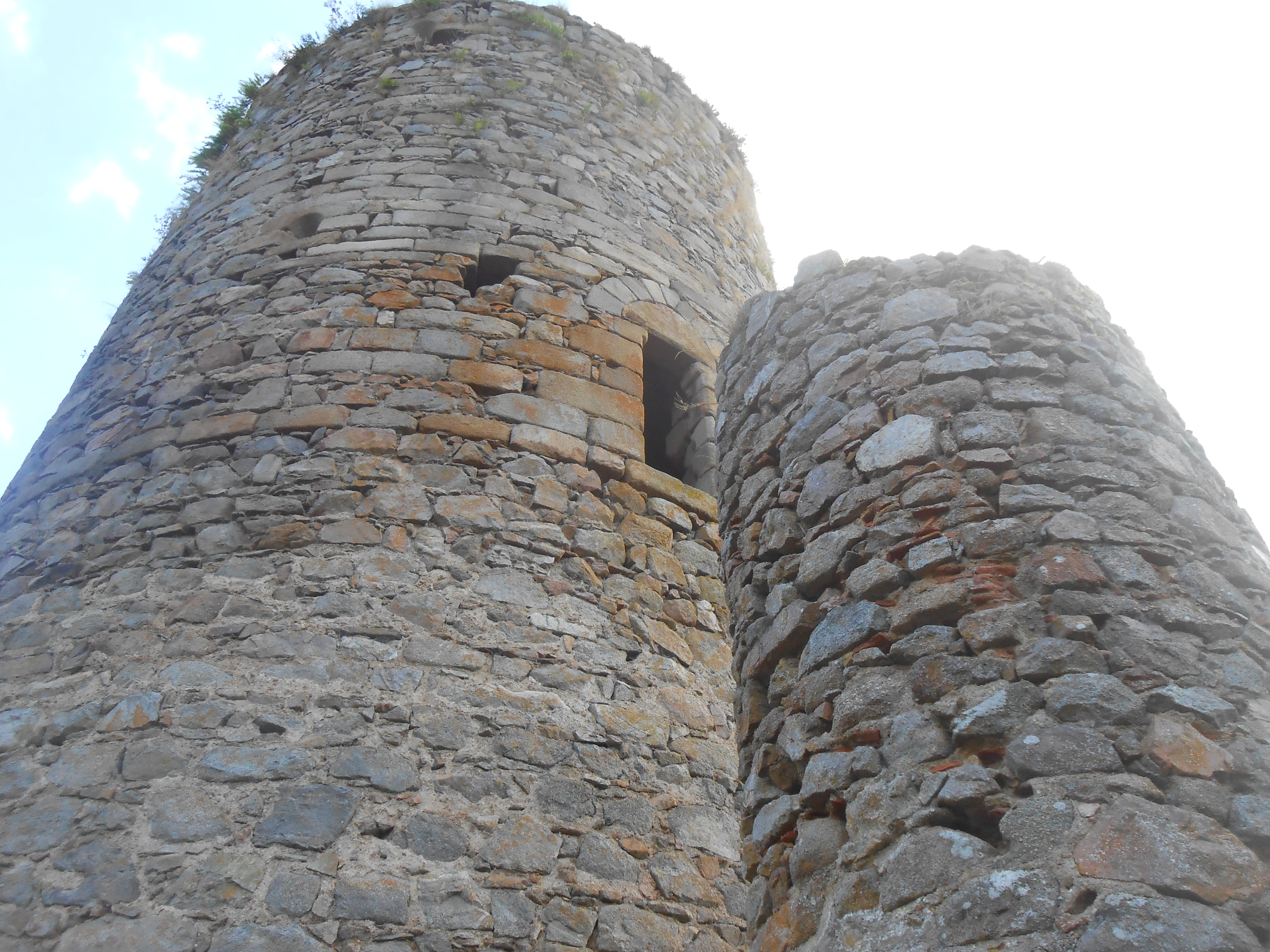 Château de l'Ours (commune de Sainte-Thérence)